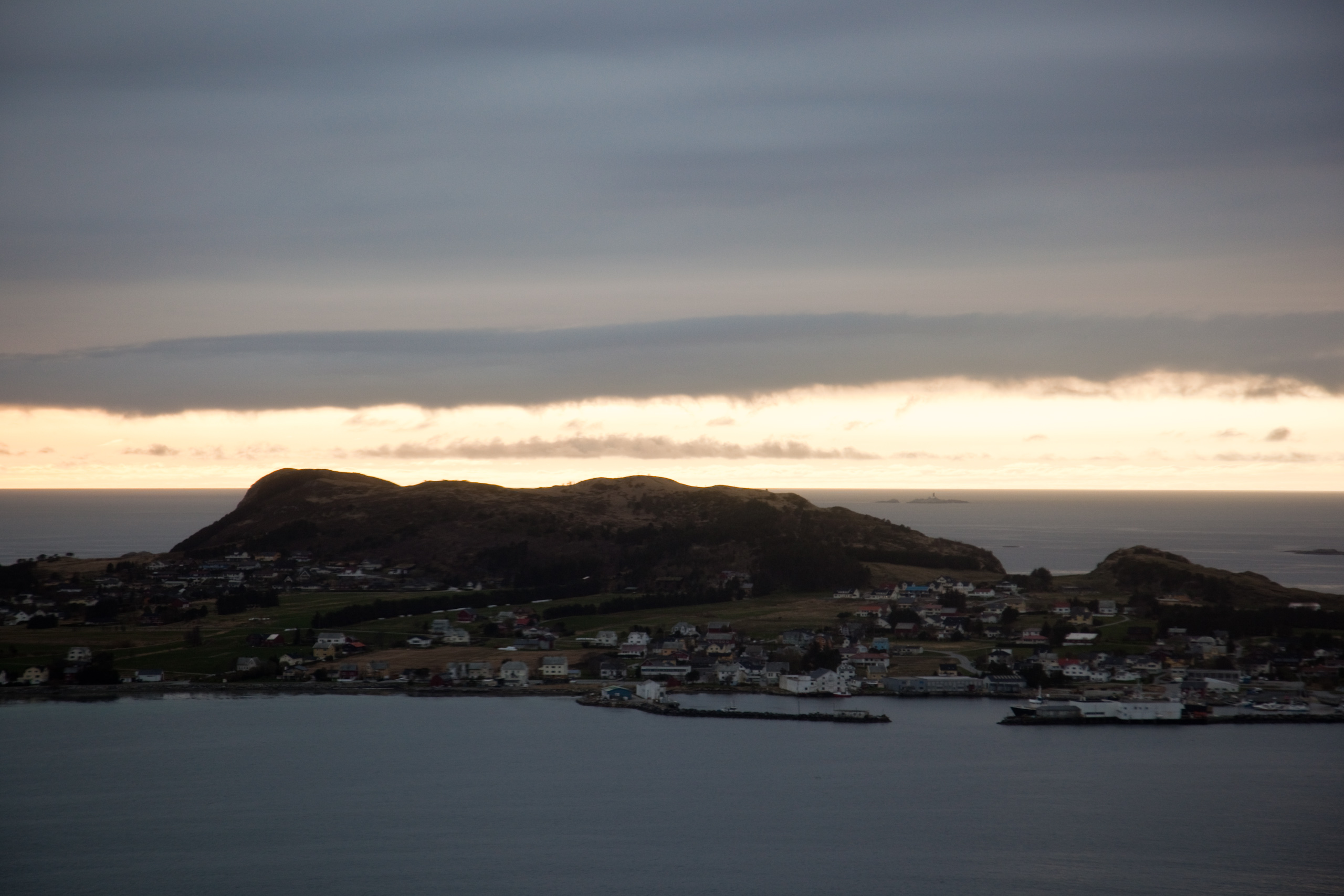 Roald på Vigra i Giske kommune